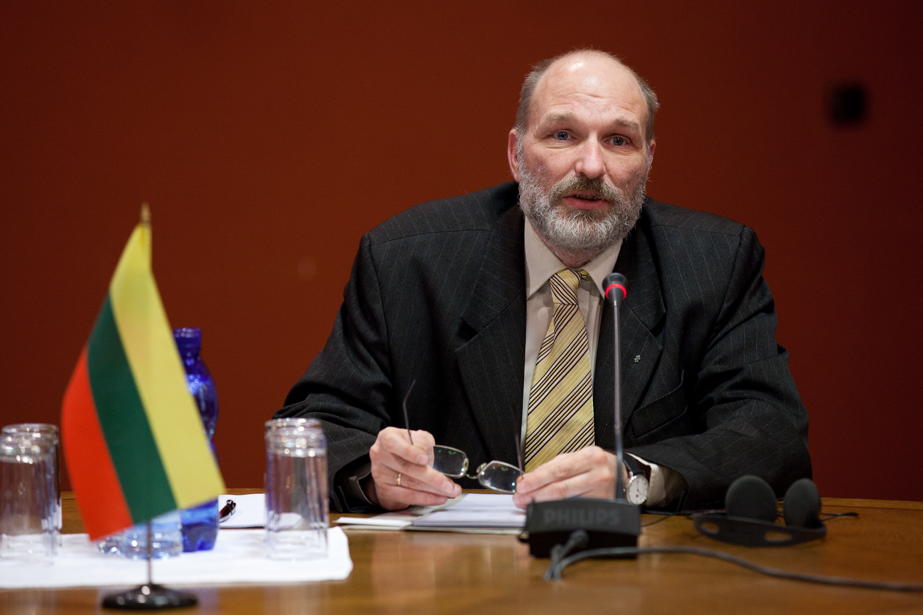 2011.gada 4.aprīlis. Deputātu grupas sadarbībai ar Lietuvas parlamentu tikšanās ar Lietuvas Republikas Seima deputātu sadarbības grupu. Attēlā: Lietuvas Republikas Seima deputātu sadarbības grupas priekšsēdētājs Sauļus Pečeļūns (Saulius Pečeliūnas). Foto: Saeima